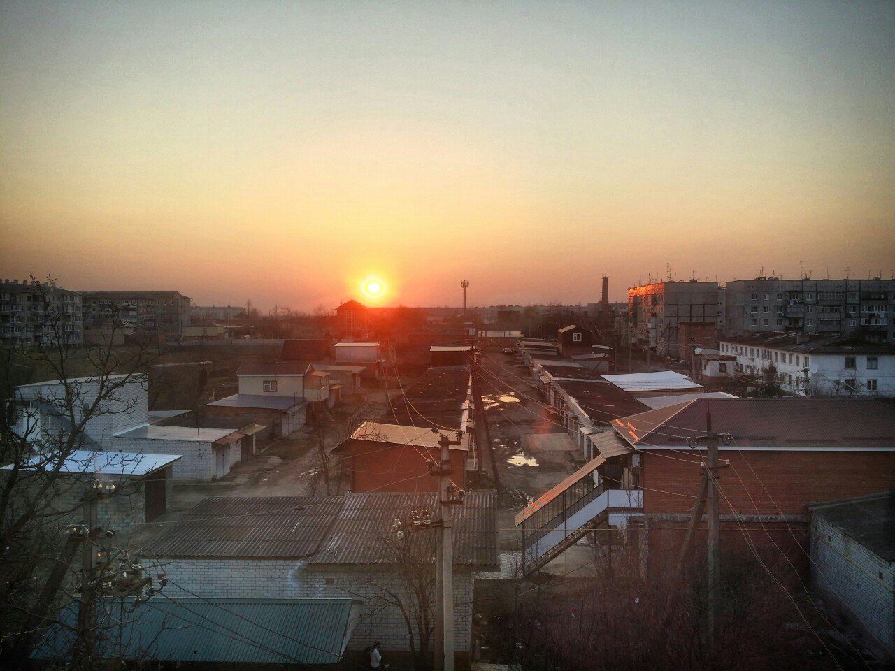 Адыгейск зимой